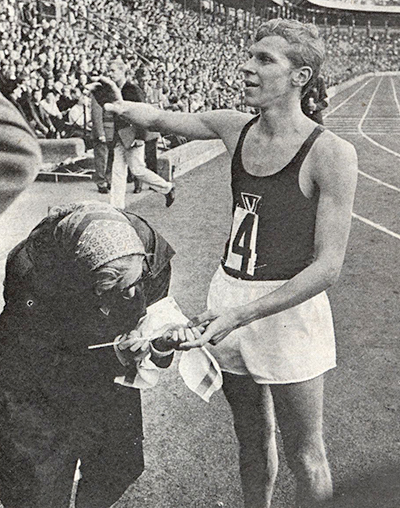 Ulf Högberg